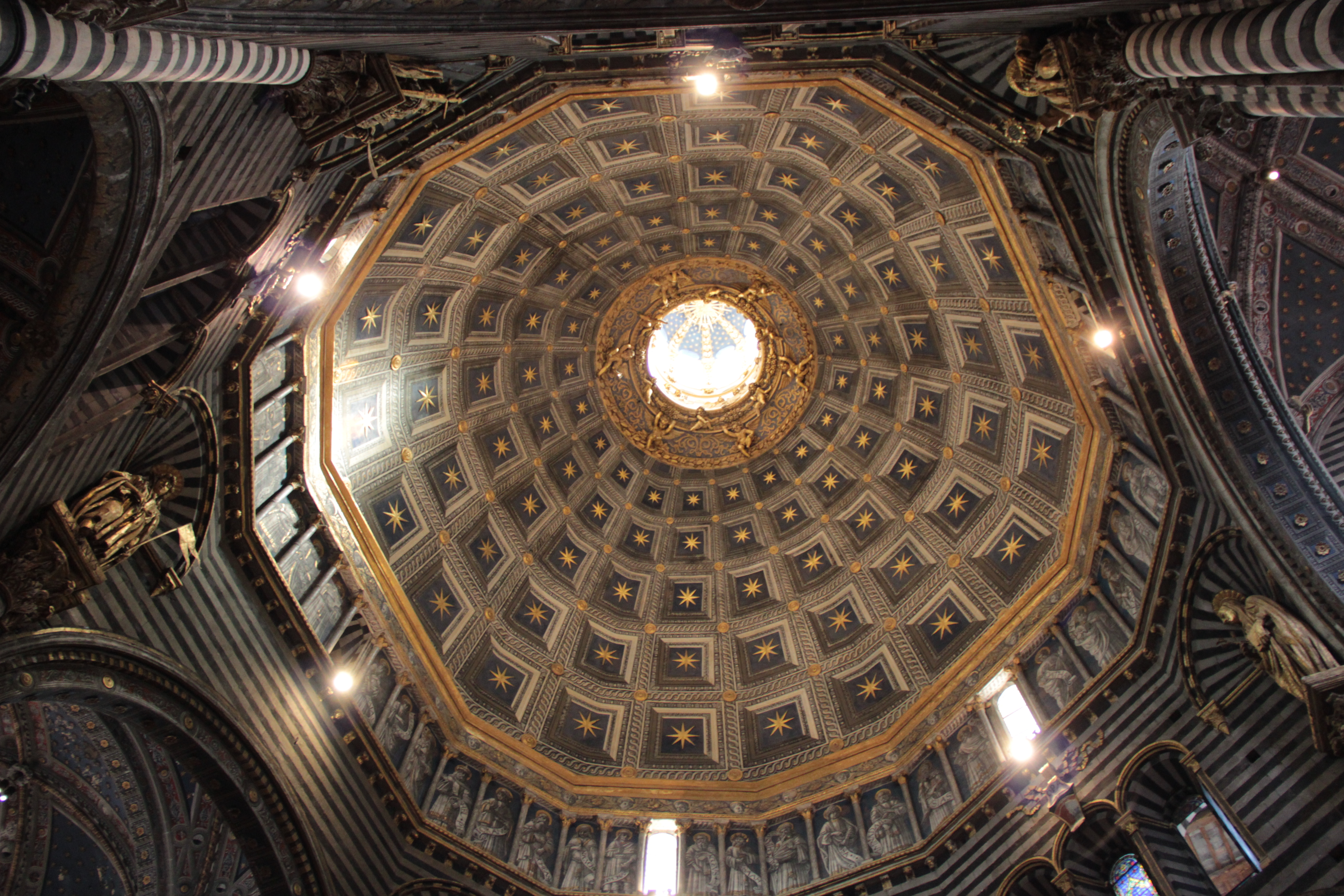 siena 05